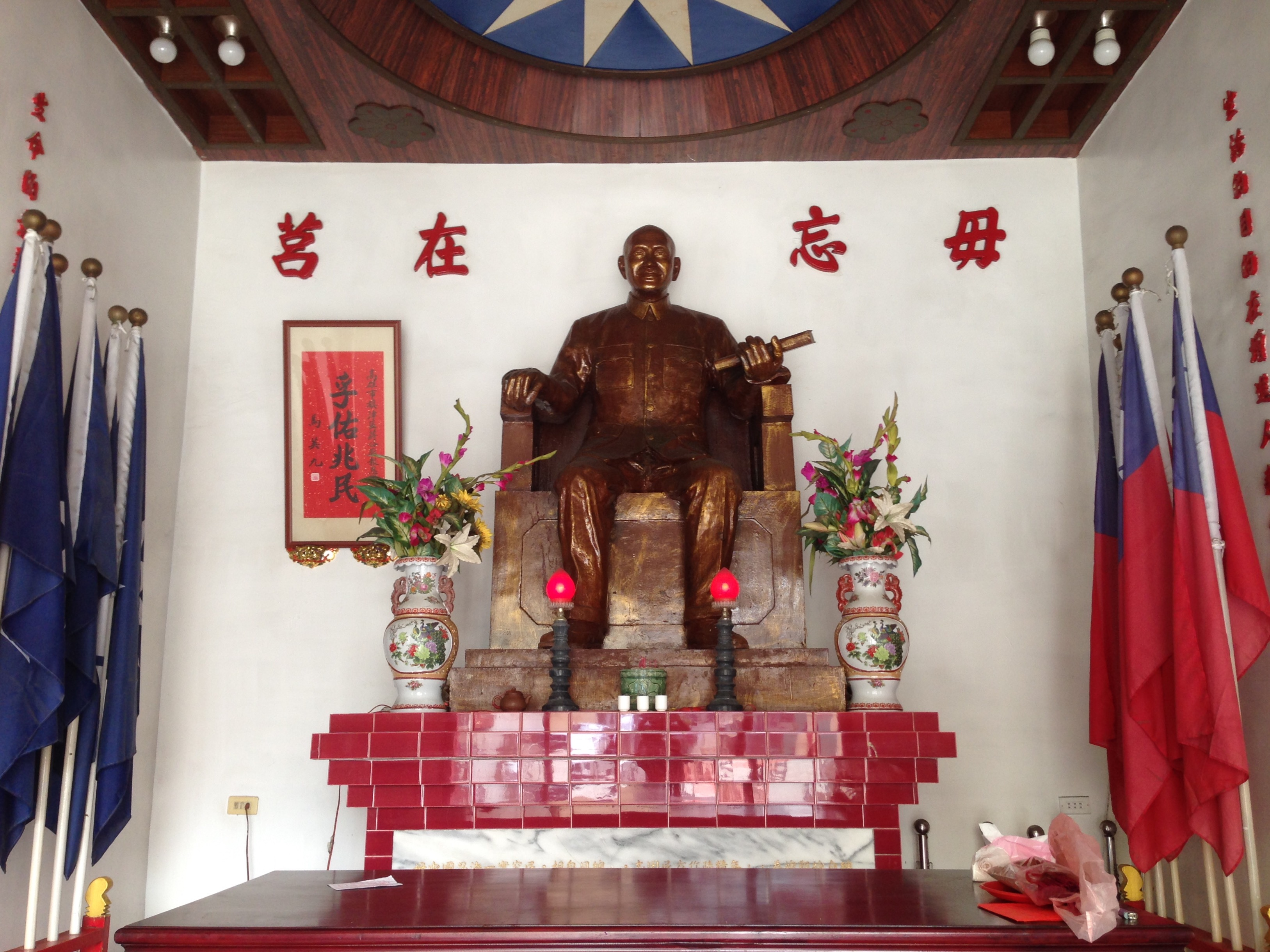 蔣公報恩觀蔣公銅像